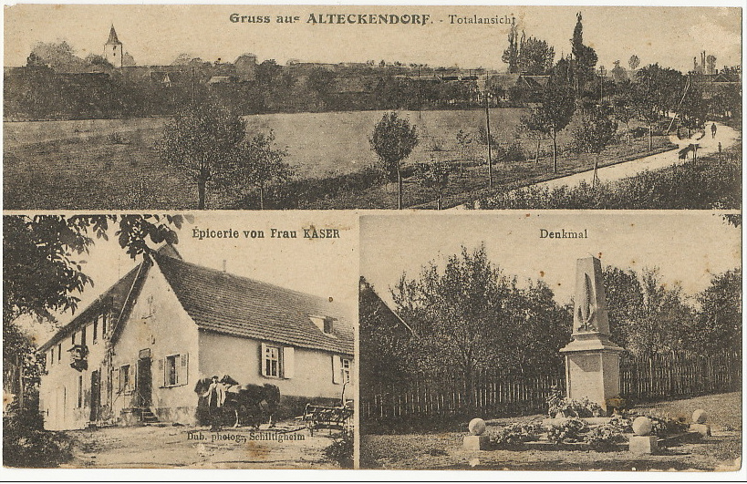 Carte postale ancienne, Alteckendorf vers 1900